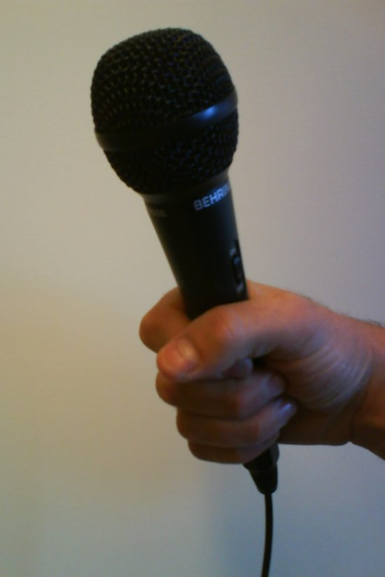 audio microphone